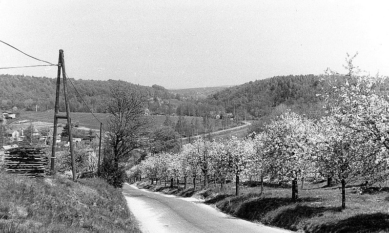 Original image description from the Deutsche FotothekTriebischtal-Rothschönberg. Ortsansicht mit Bleymühle vom Bleyberg